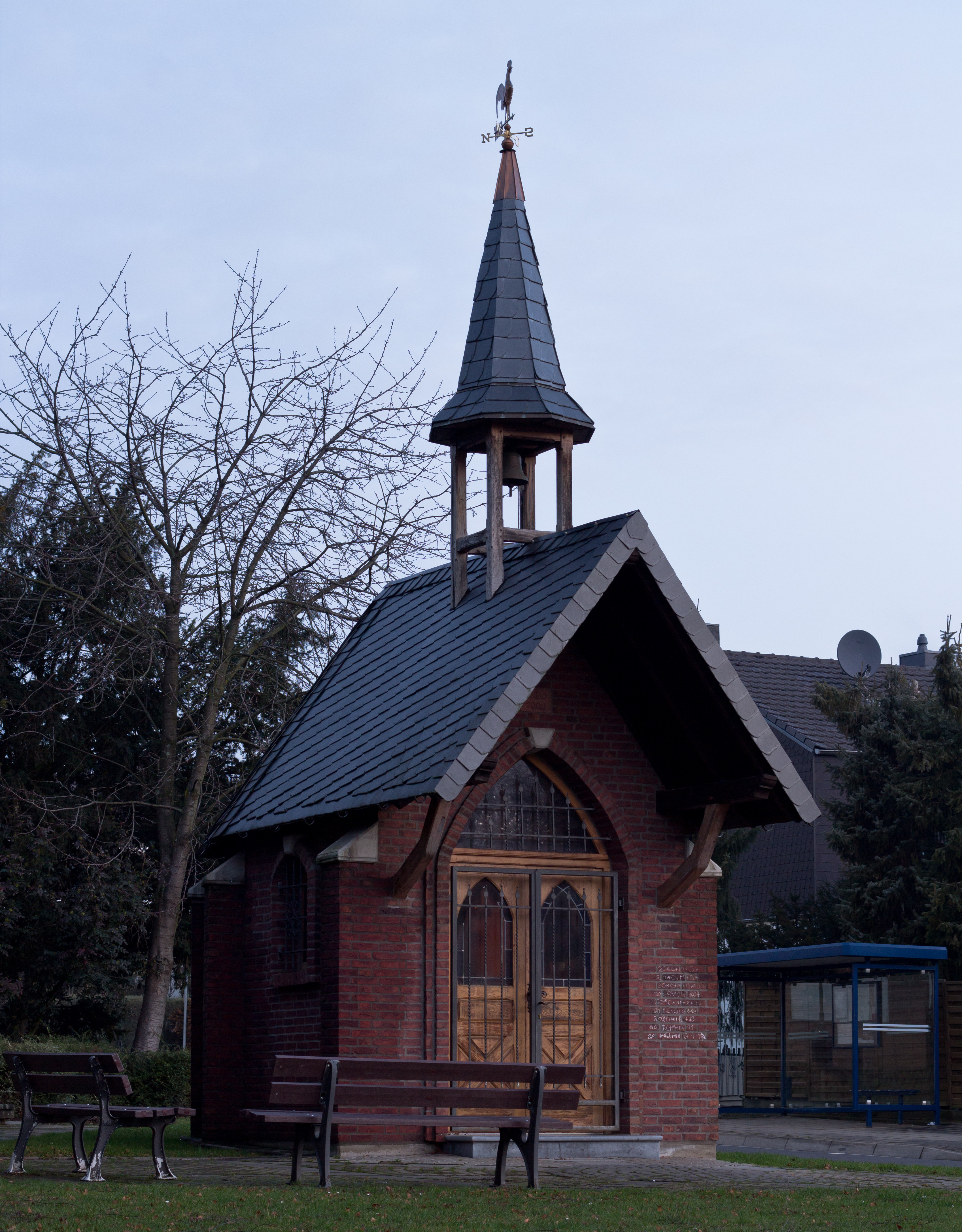 Kapelle des St. Longinus in Eschweiler, Ortsteil Vöckelsberg